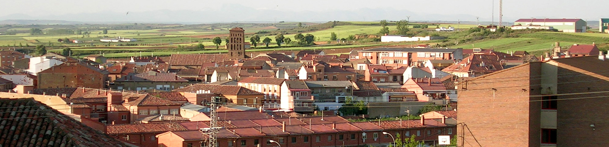 Sahagún desde las alturas.